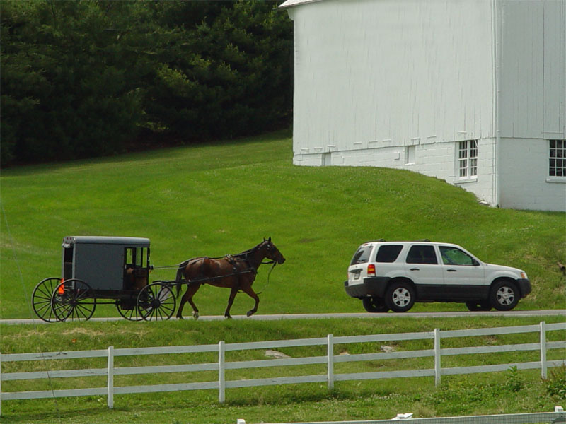 Descrizione; Carro di contadini Amish nel traffico comune Data: 29 maggio 2004 Luogo: Lancaster County (USA) Fotografo: TheCADexpert